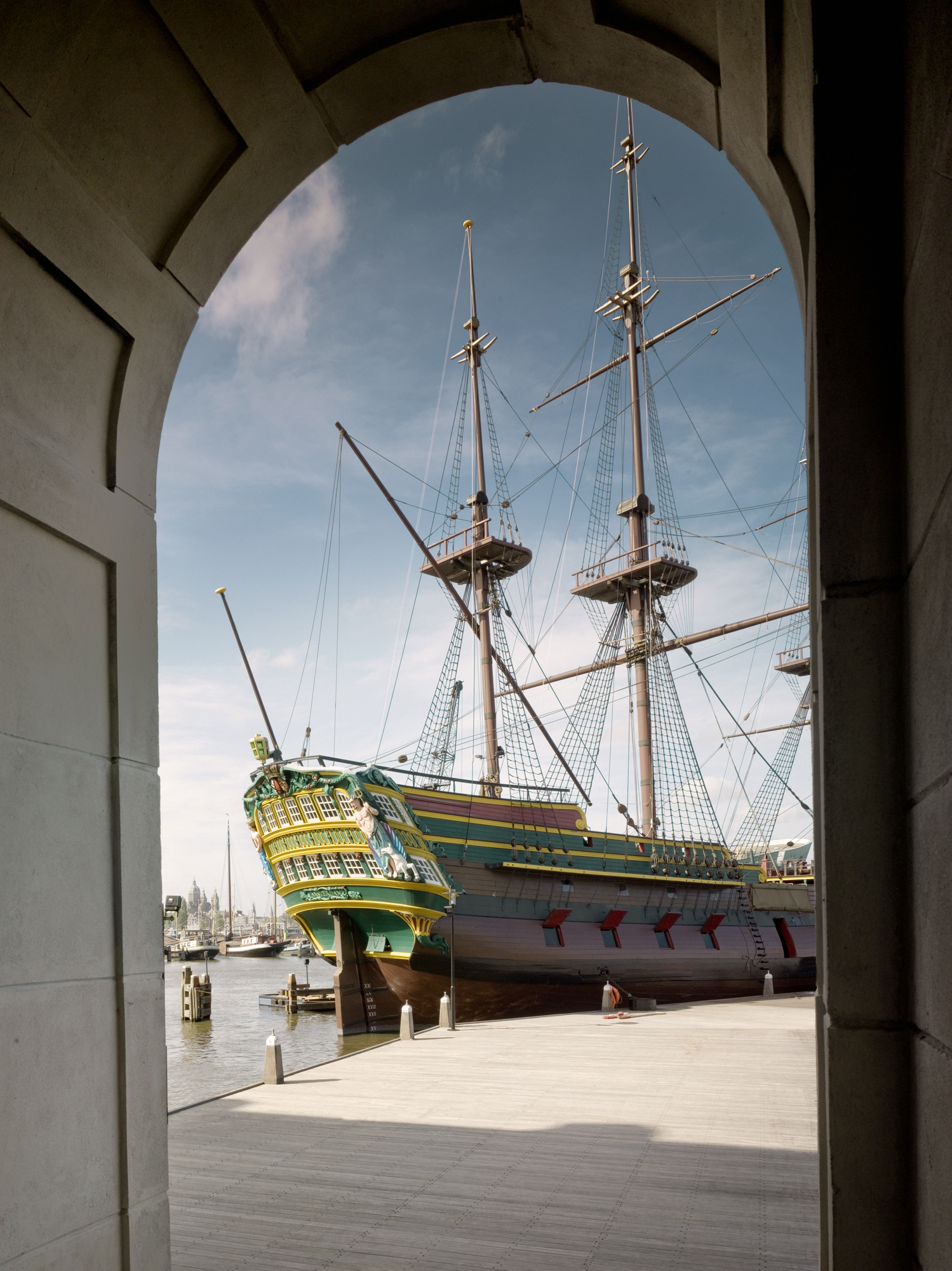 VOC-schip